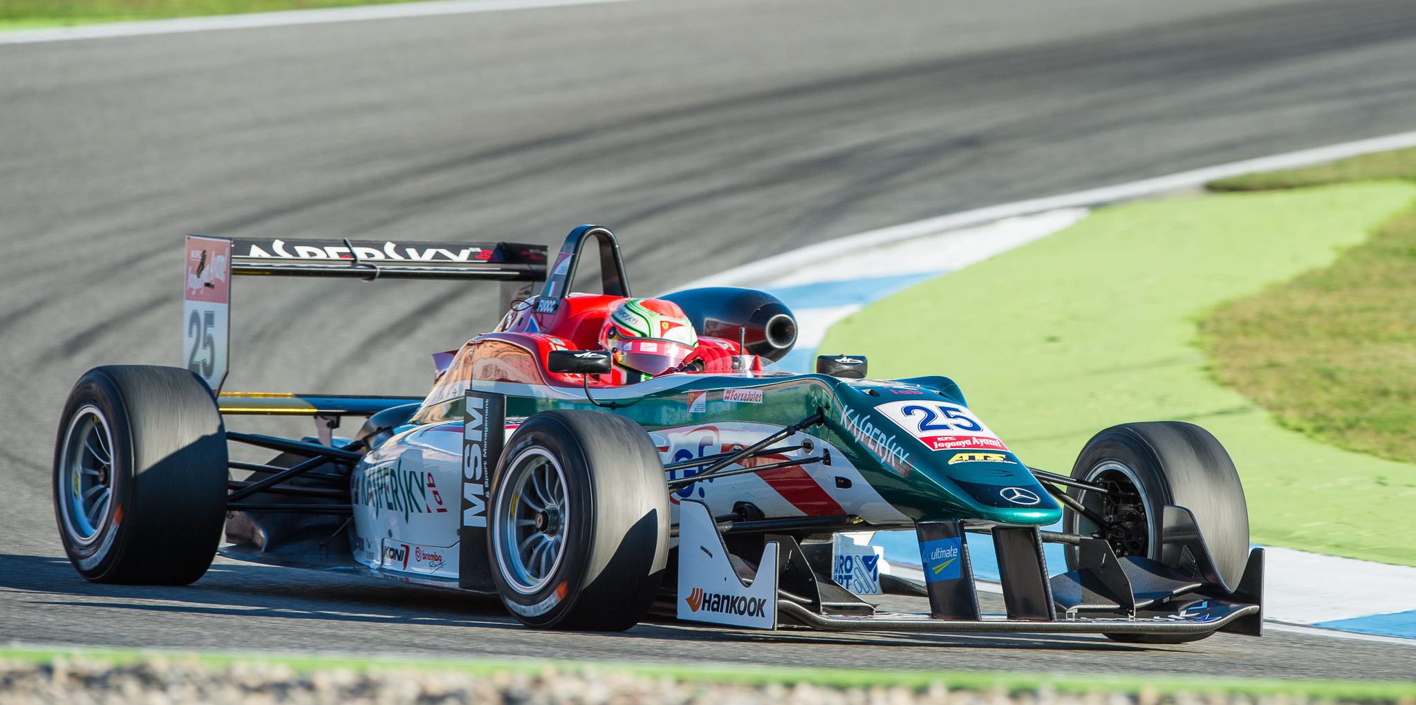 Antonio Fuoco,DTM,Dallara F312,Deutsche Tourenwagen Masters,F3 FIA European Championship,FIA Formel 3 Europameisterschaft,Hockenheimring,Mercedes-Benz,Motorsport,Prema Powerteam